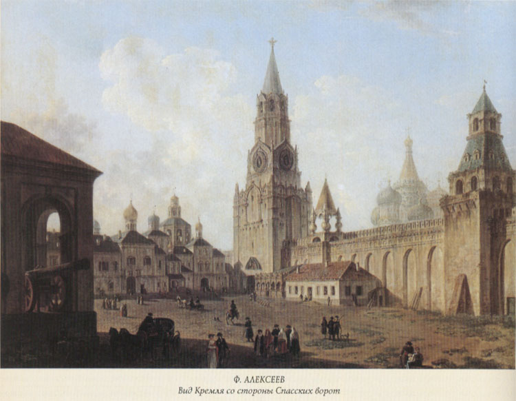 View from the Kremlin's Spassky Gate Вид Спасских ворот в Кремле